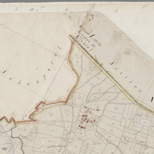 Nederlandse kadasterkaart met een deel van de sectie Mathijseind bij Bakel in de vroege 19e eeuw